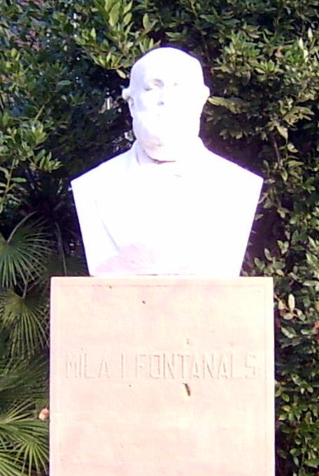 Bust de Manuel Milà i Fontanals, situat al Parc de la Ciutadella, a Barcelona. Manuel Milà i Fontanals (1818-1884), filòleg, erudit i escriptor. Va néixer a Vilafranca del Penedès. Se'l considera un dels impulsors de la Renaixença, gràcies als seus esforços en la restauració dels Jocs Florals, i en el camp de l'ortografia. És obra de Manuel Fuxà, segons aquesta referència